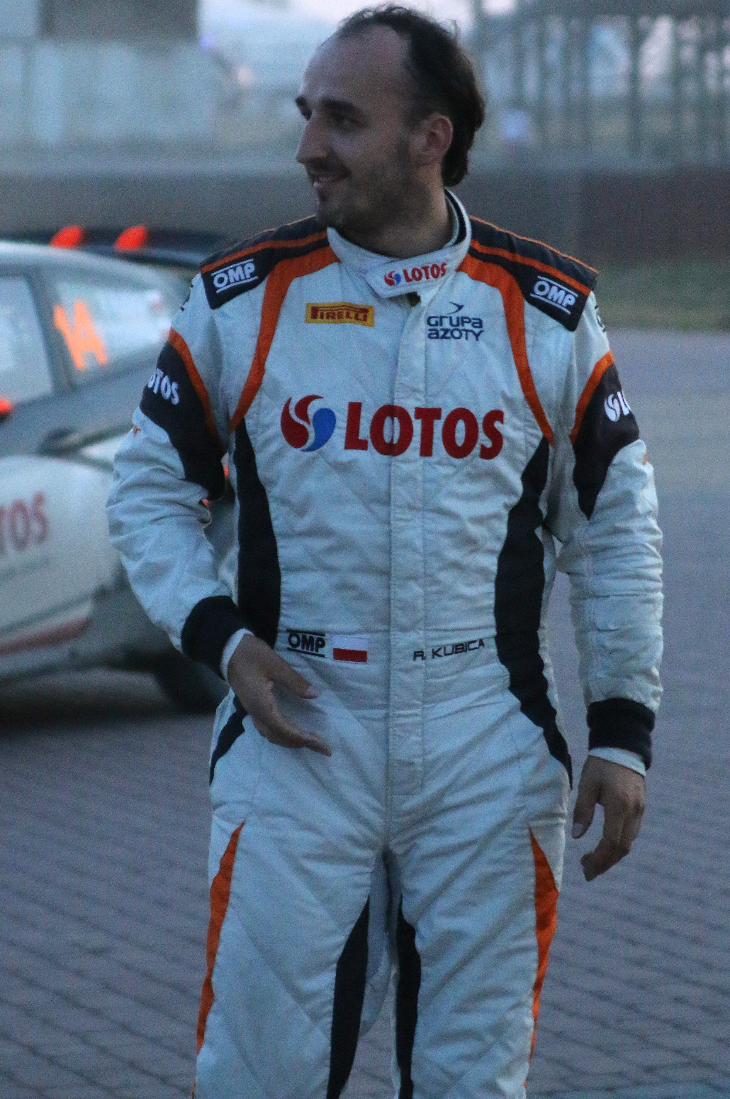 Robert Kubica